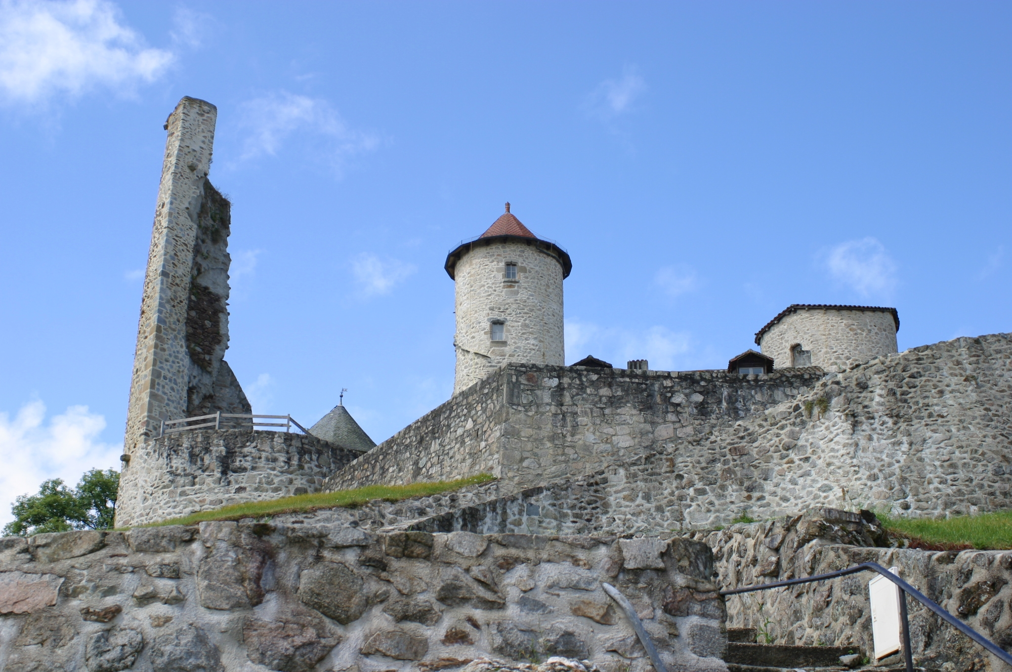 Chateau de Laroquebrou